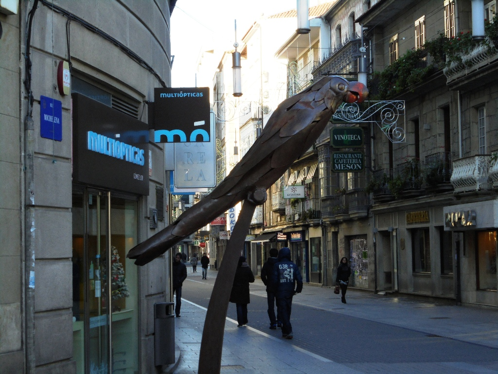 Escultura Loro Ravachol, en Pontevedra capital